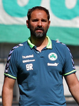 Stefan Ruthenbeck als Trainer der SpVgg Greuther Fürth beim Auswärtsspiel gegen den 1. FC Kaiserslautern im Fritz-Walter-Stadion